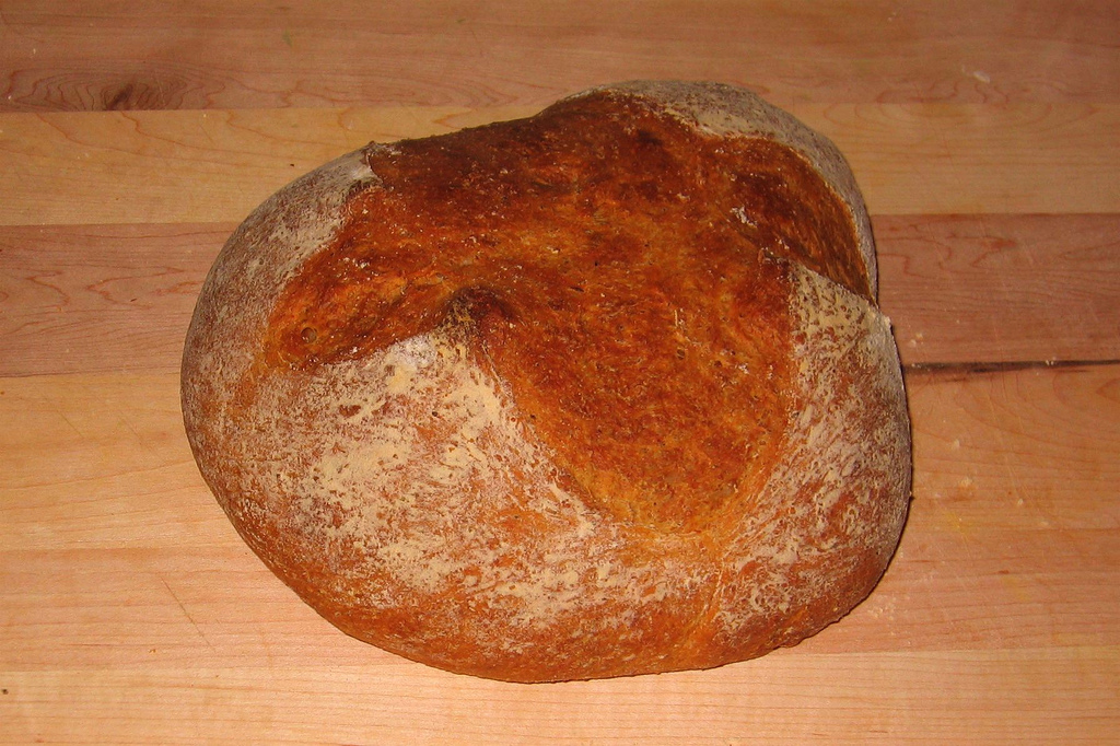 5-mantovana